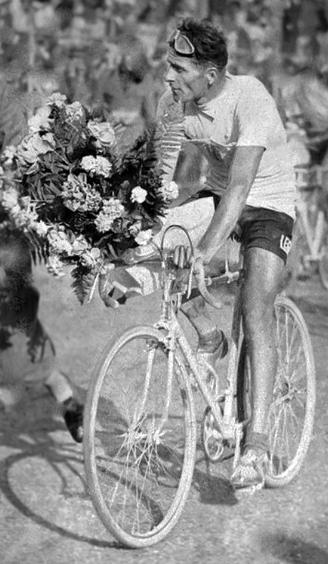 Il ciclista Alfredo Binda vincitore del Giro d'Italia 1933 al giro d'onore nell'Arena Civica di Milano (28 maggio 1933) Tratto da "Lo sport fascista" n. 6, 1933